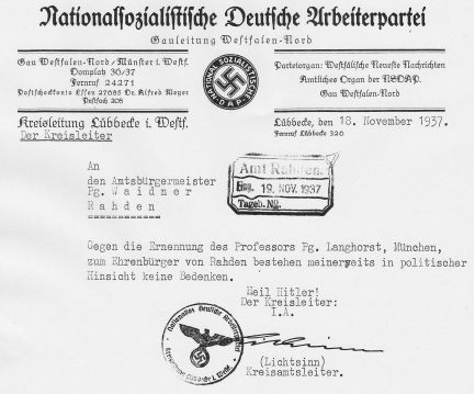 Schreiben NSDAP an Bürgermeister in Rahen. 18. November 1937. Nationalsozialistische Deutsche Arbeiterpartei, Gauleitung Westfalen-Nord Lübbeke, den 18. November 1937 An den Amtsbürgermeister Pg. Waidner, Rahden [...]